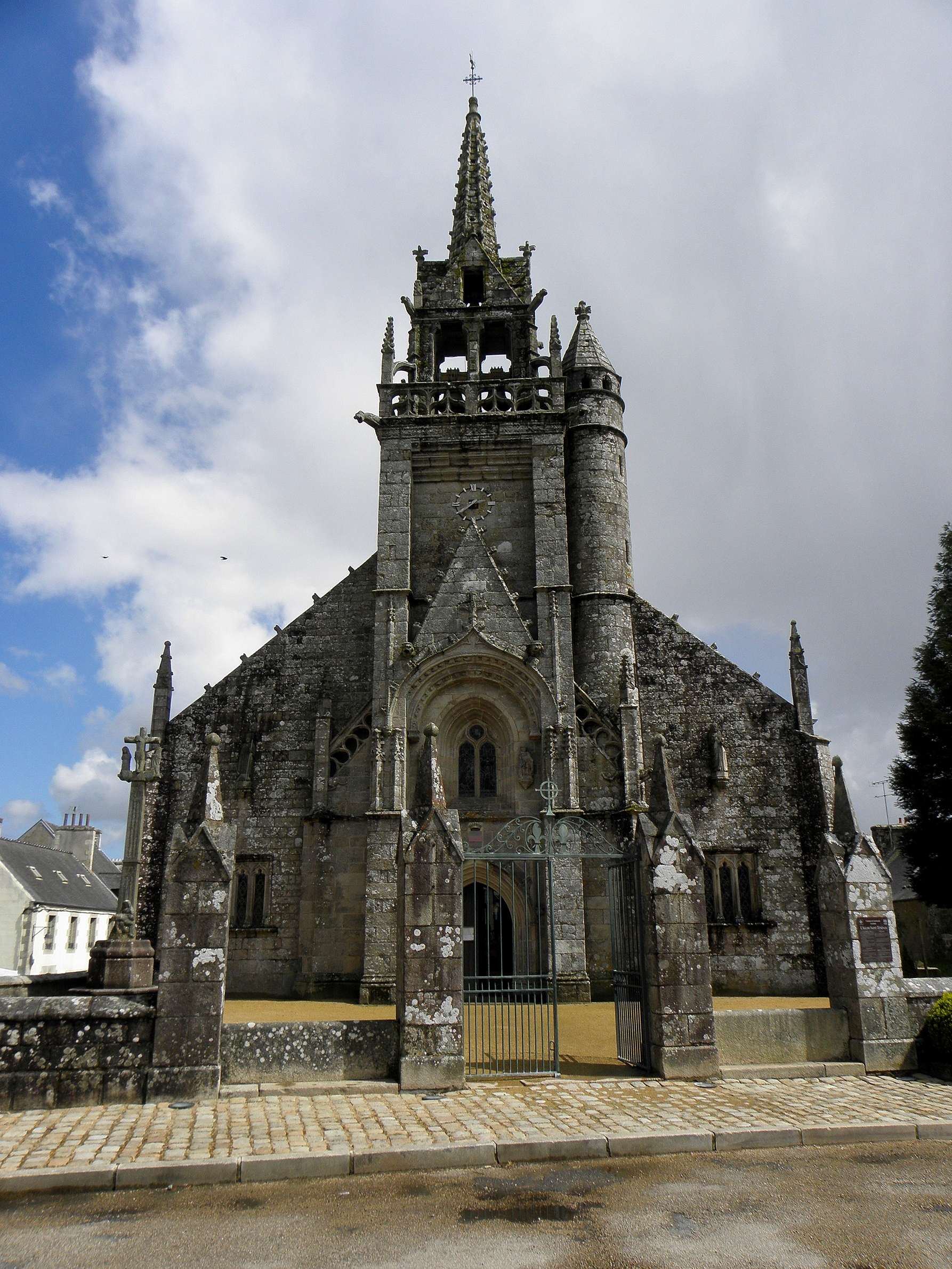 Église Saint-Ténénan de Guerlesquin (29). Façade occidentale.